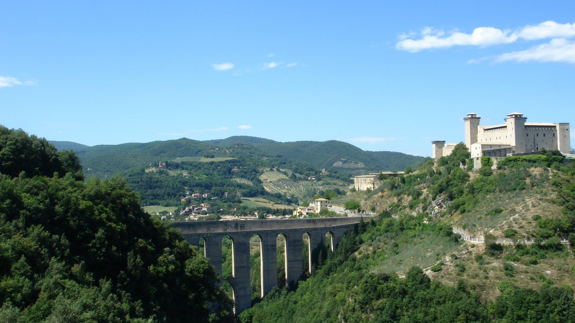 Italia